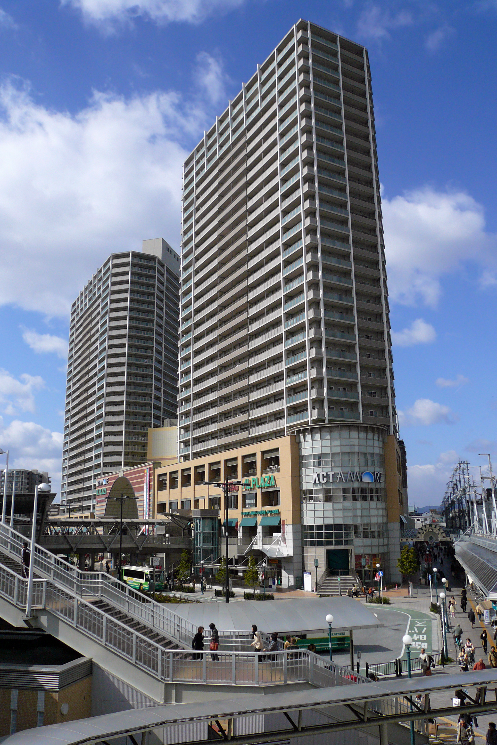 In front of JR Takatsuki Station, Takatsuki, Osaka prefecture, Japan